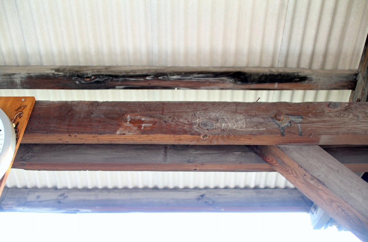 北海道行き跡